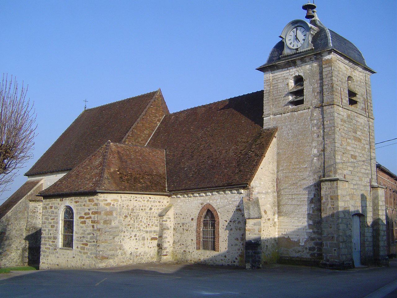 Villadin - L'église